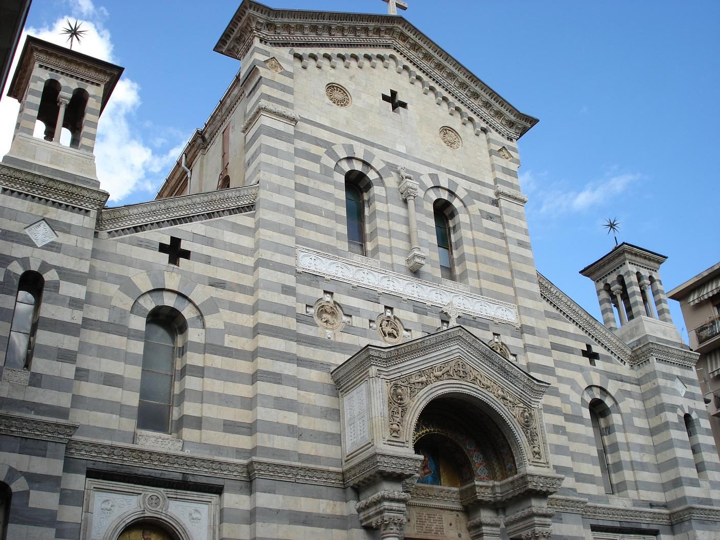 Chiesa di Nostra Signora della Neve - La Spezia - Italia